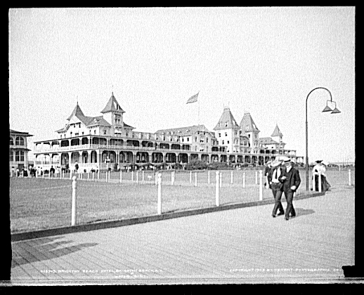 Luxushotel Brighton Beach, Brighton Beach, New York. Linke Hälfte eines ursprünglich zweiteiligen Panoramabildes.